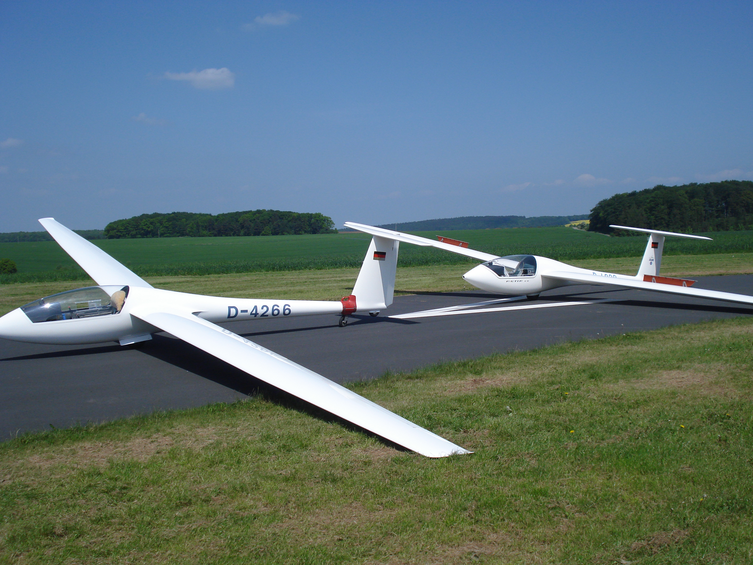 Ein Jeans-Astir und eine LS 4 am Start auf dem Flugplatz Günterode/Heiligenstadt